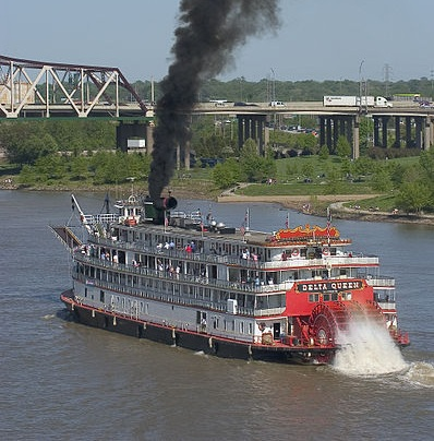 Heckraddampfer Delta Queen, erbaut 1926